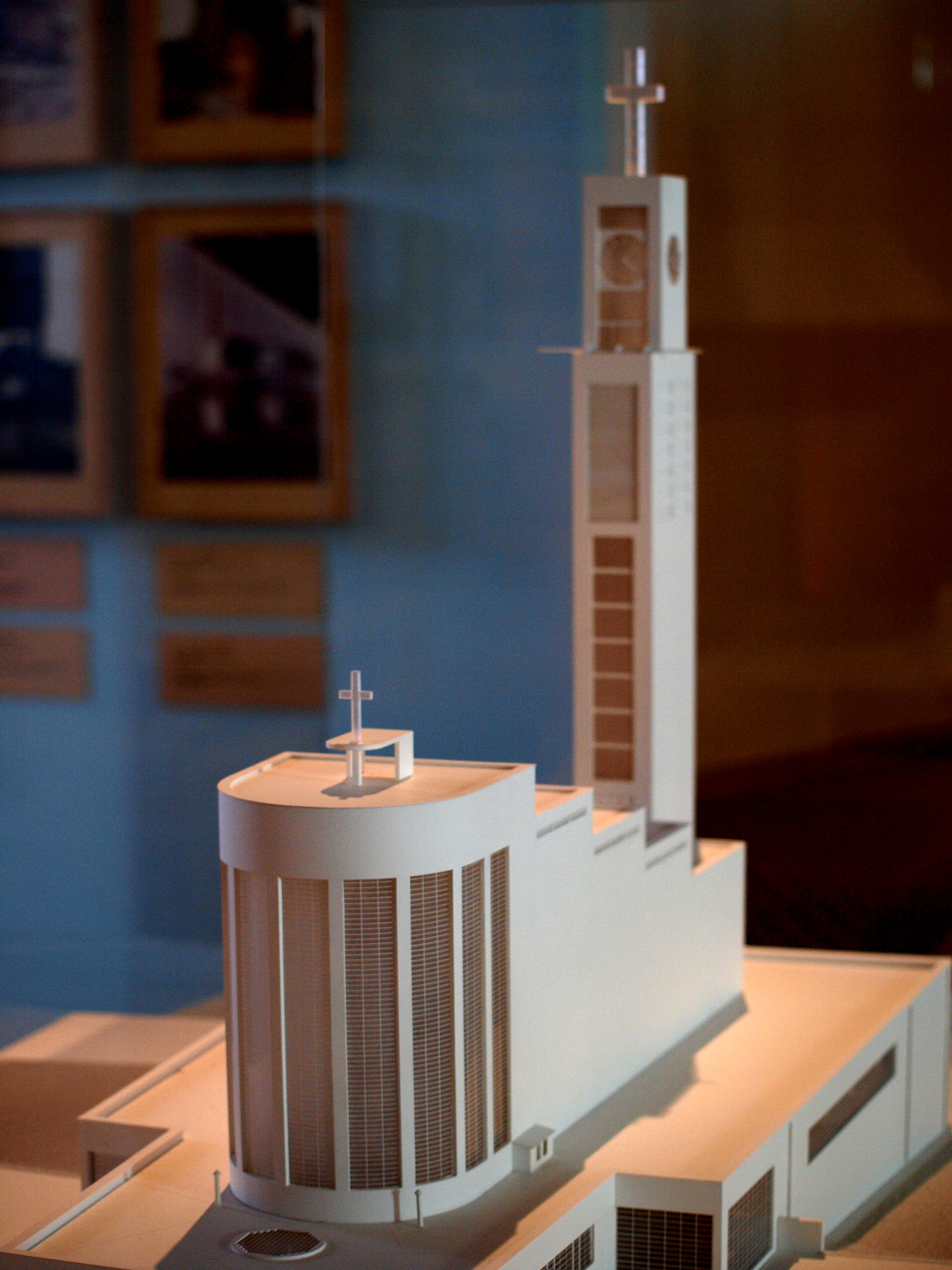 Praha - kostel svatého Václava